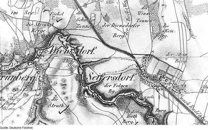 Original image description from the Deutsche Fotothek Wachau-Seifersdorf. Ausschnitt aus: Oberreit, Sect. Großenhain, 1841/43